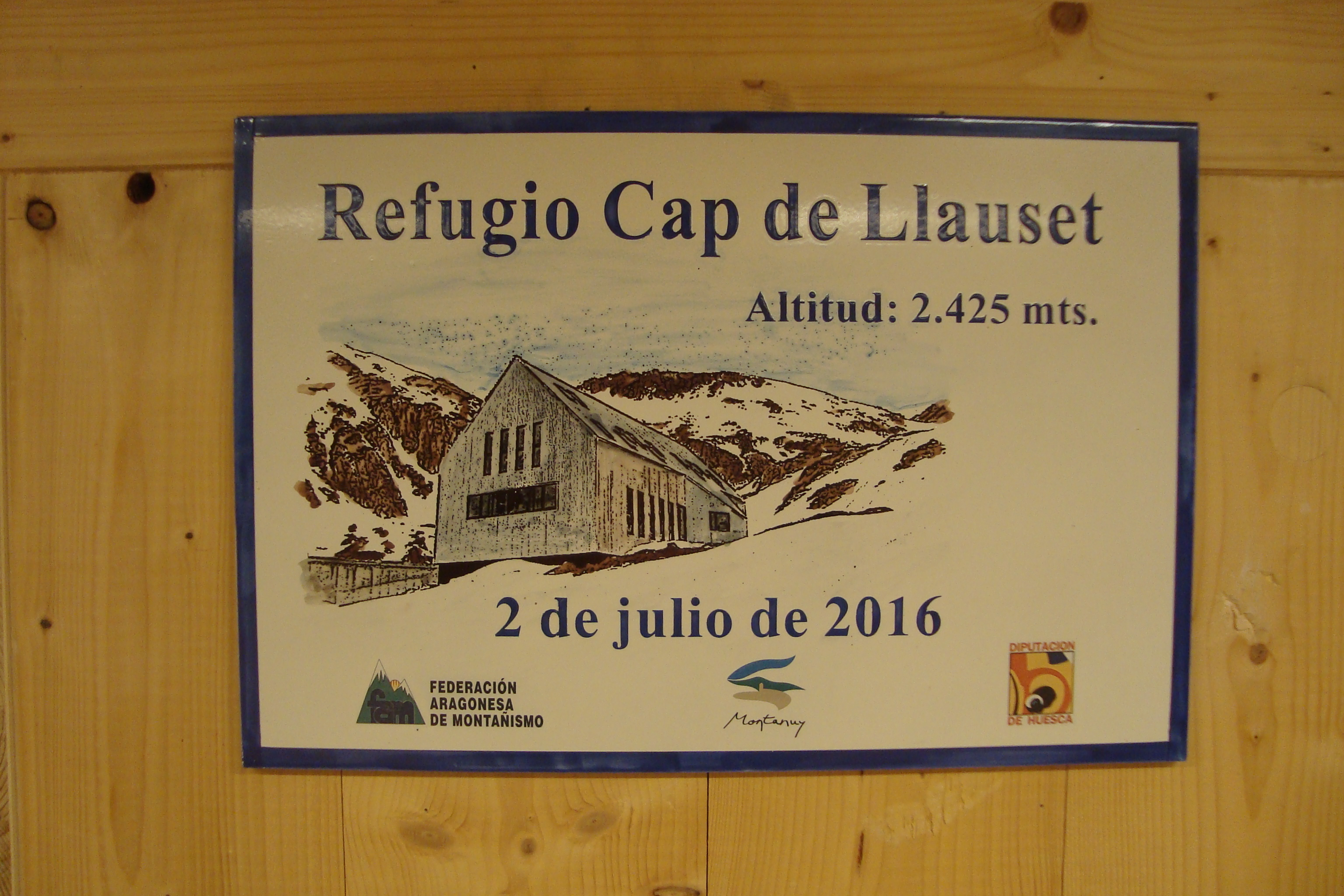 Refugi Cap de Llauset, Parc Natural de Pocets-Maladeta